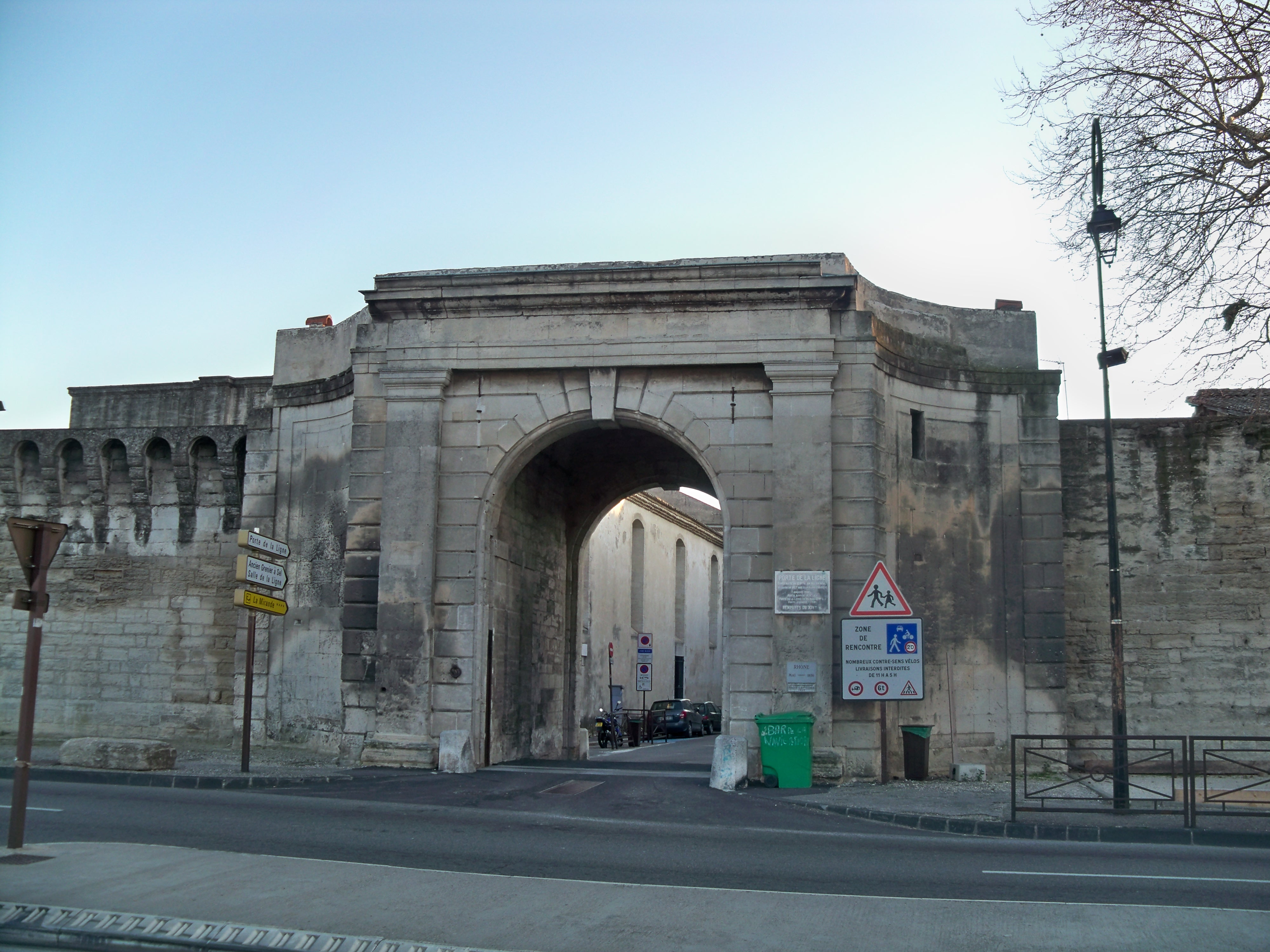 Porte de la Ligne des remparts d'Avignon, Vaucluse, France